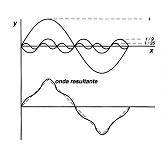 Ondasfou